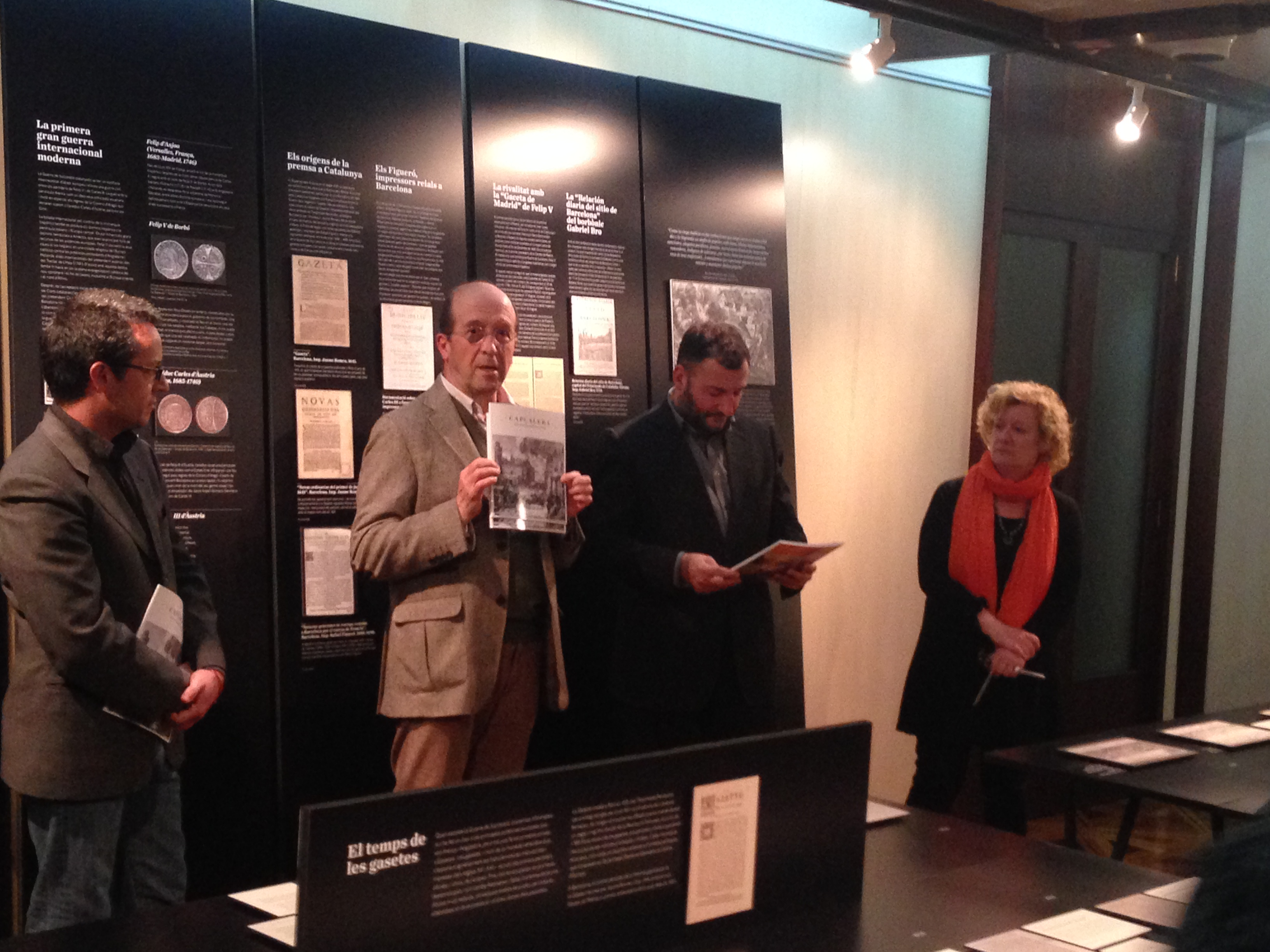 Inauguració de l'exposició "1714. Notícies i propaganda". Amb el catedràtic de Periodisme de la UPF, Jaume Guillamet, l’historiador i museòleg Daniel Venteo, la degana, Neus Bonet, i Toni Soler, periodista